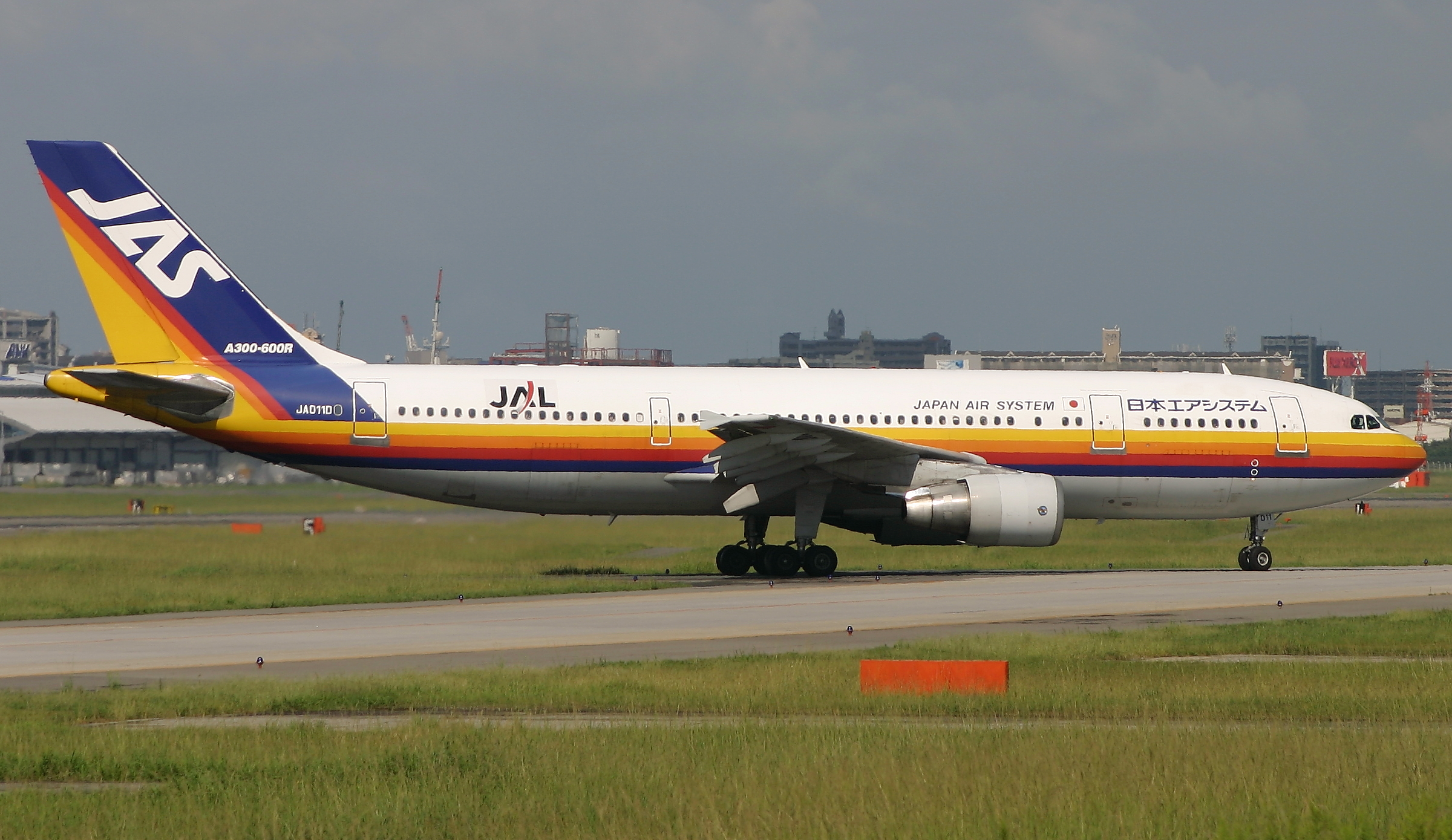 日本エアシステム エアバス A300-600R 福岡空港